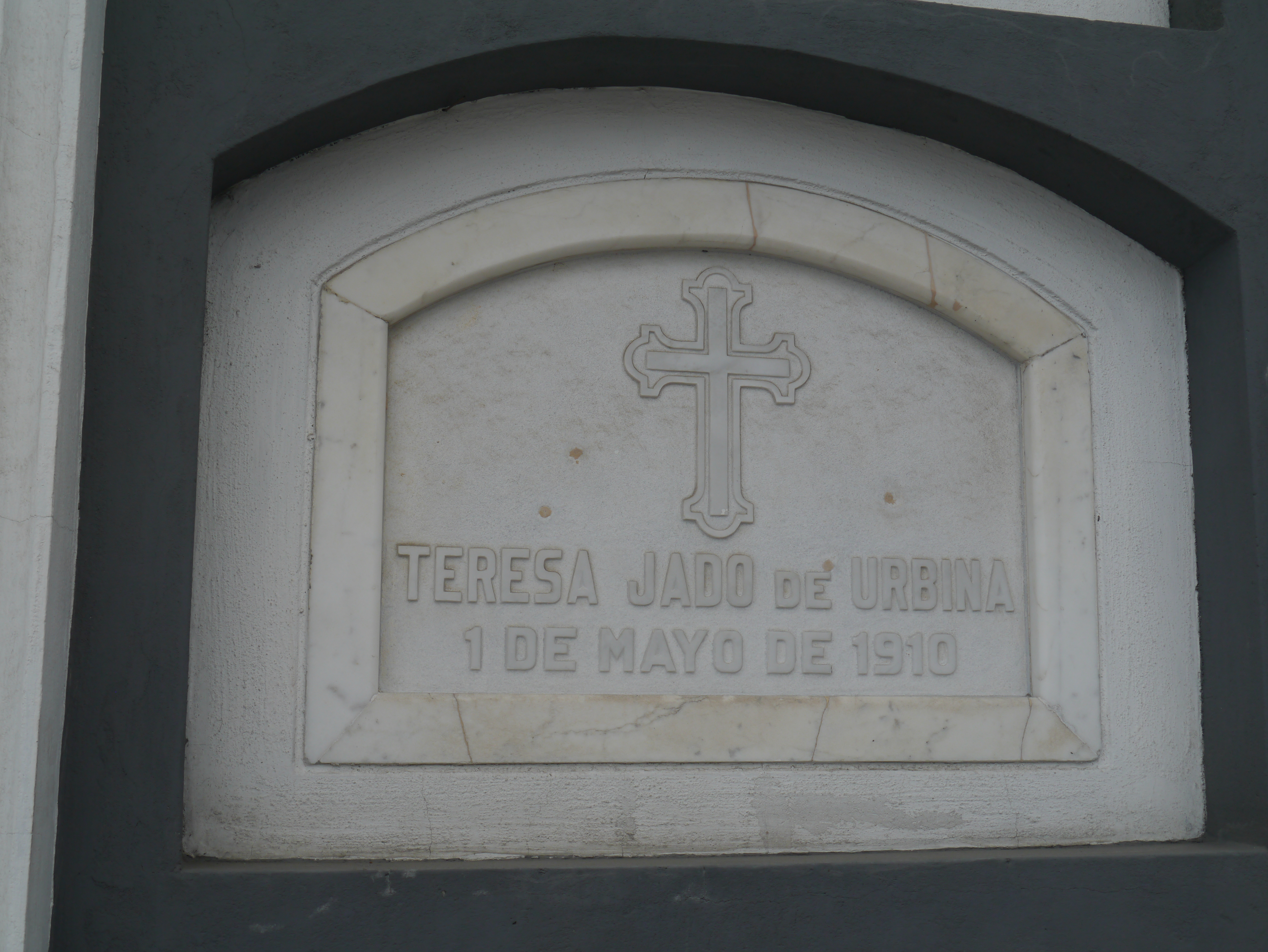 Tumba de Teresa Jado de Urvina en el Cementerio Patrimonial de Guayaquil